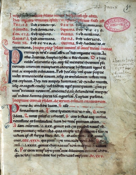 Manuscrito I de la Real Academia de la Historia (España). Incipit de la Crónica najerense.